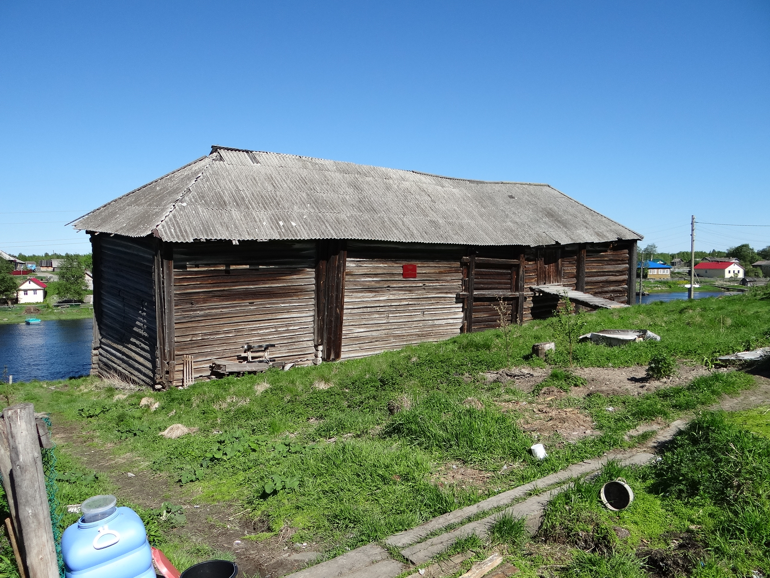 Амбар соловецкого монастыря (Республика Карелия, Беломорск, село сумский посад)